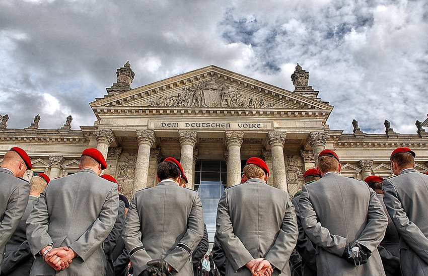 Bundewehr Zeremonie vor dem Reichstag in Berlin.